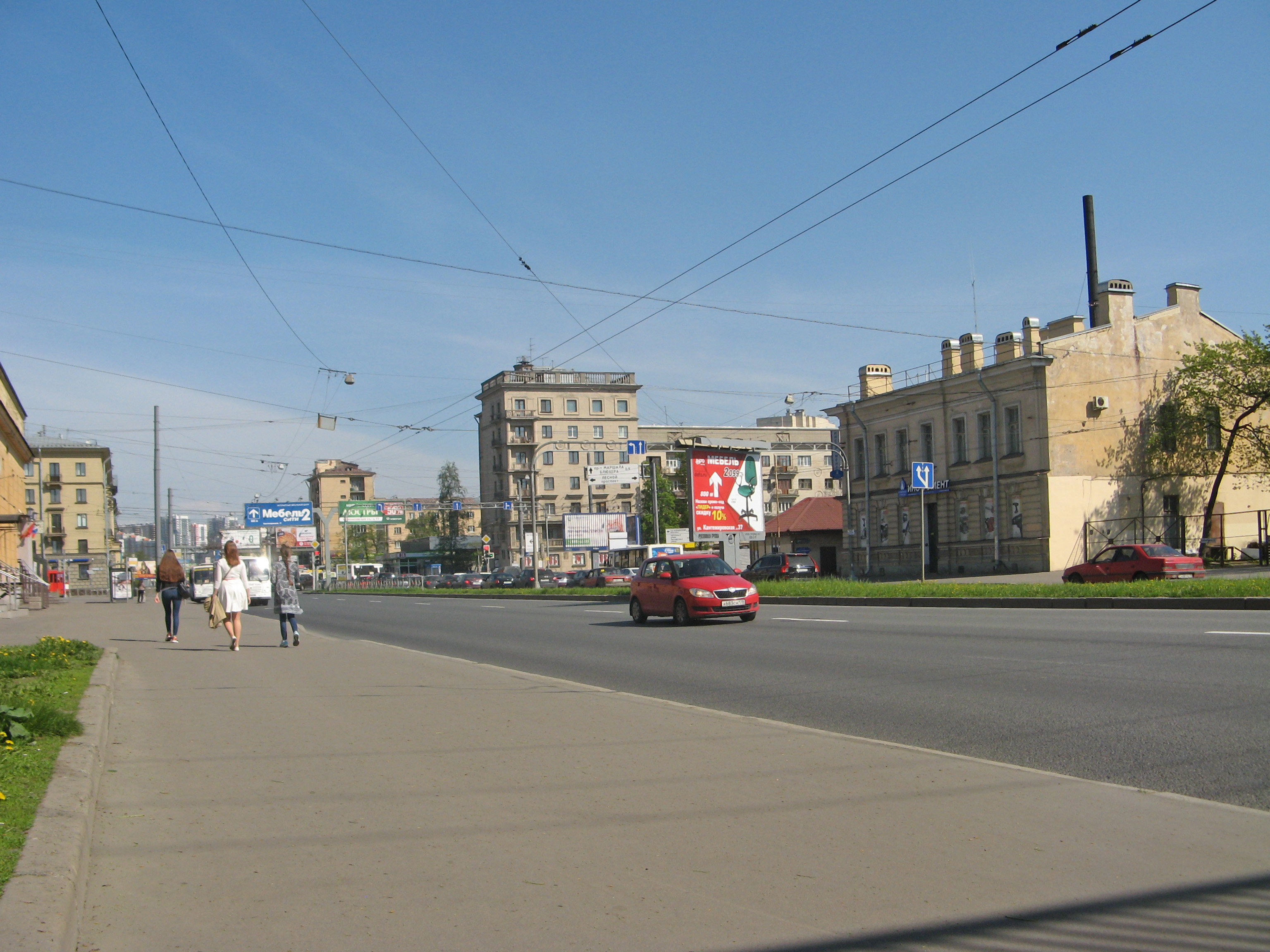 Кантемировская улица, Санкт-Петербург